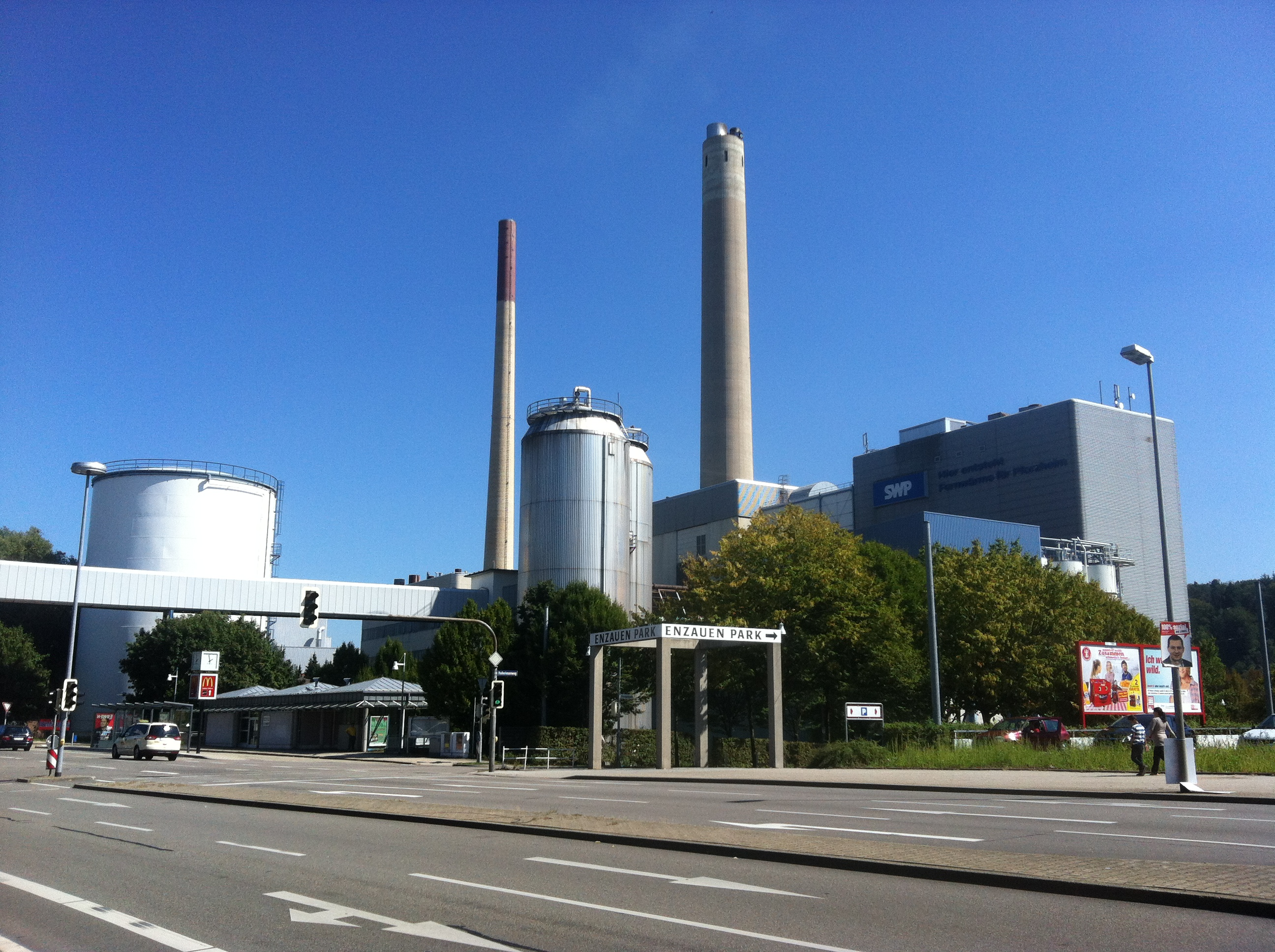 Heizkraftwerk Pforzheim